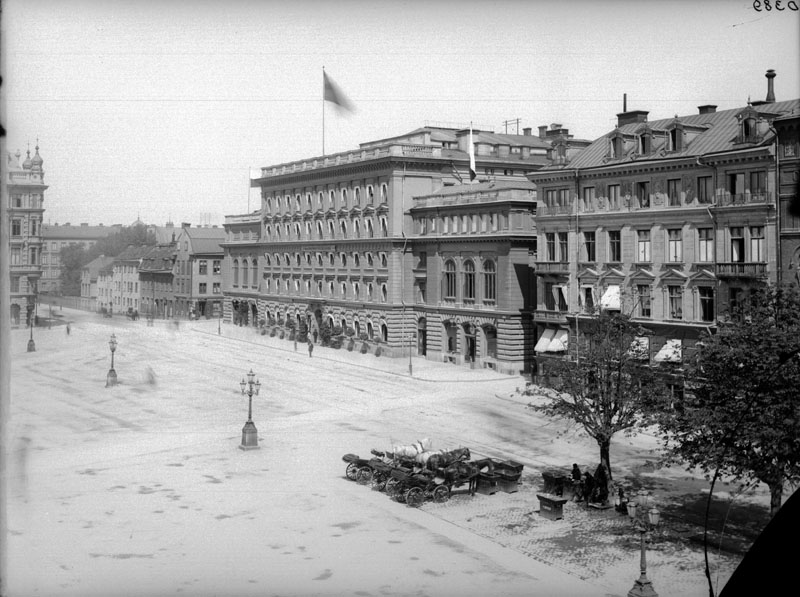 Klara Vattugränd 4, Hotell Continental. Arkitekt Magnus Isæus 1883